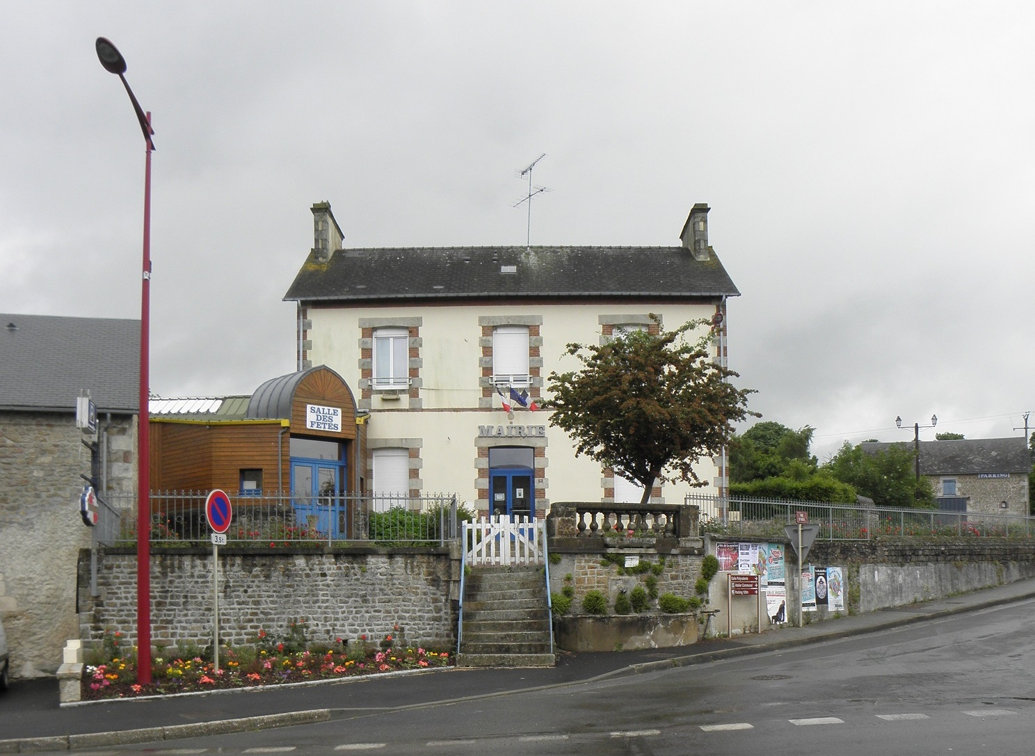 Mairie de Lalacelle (61).